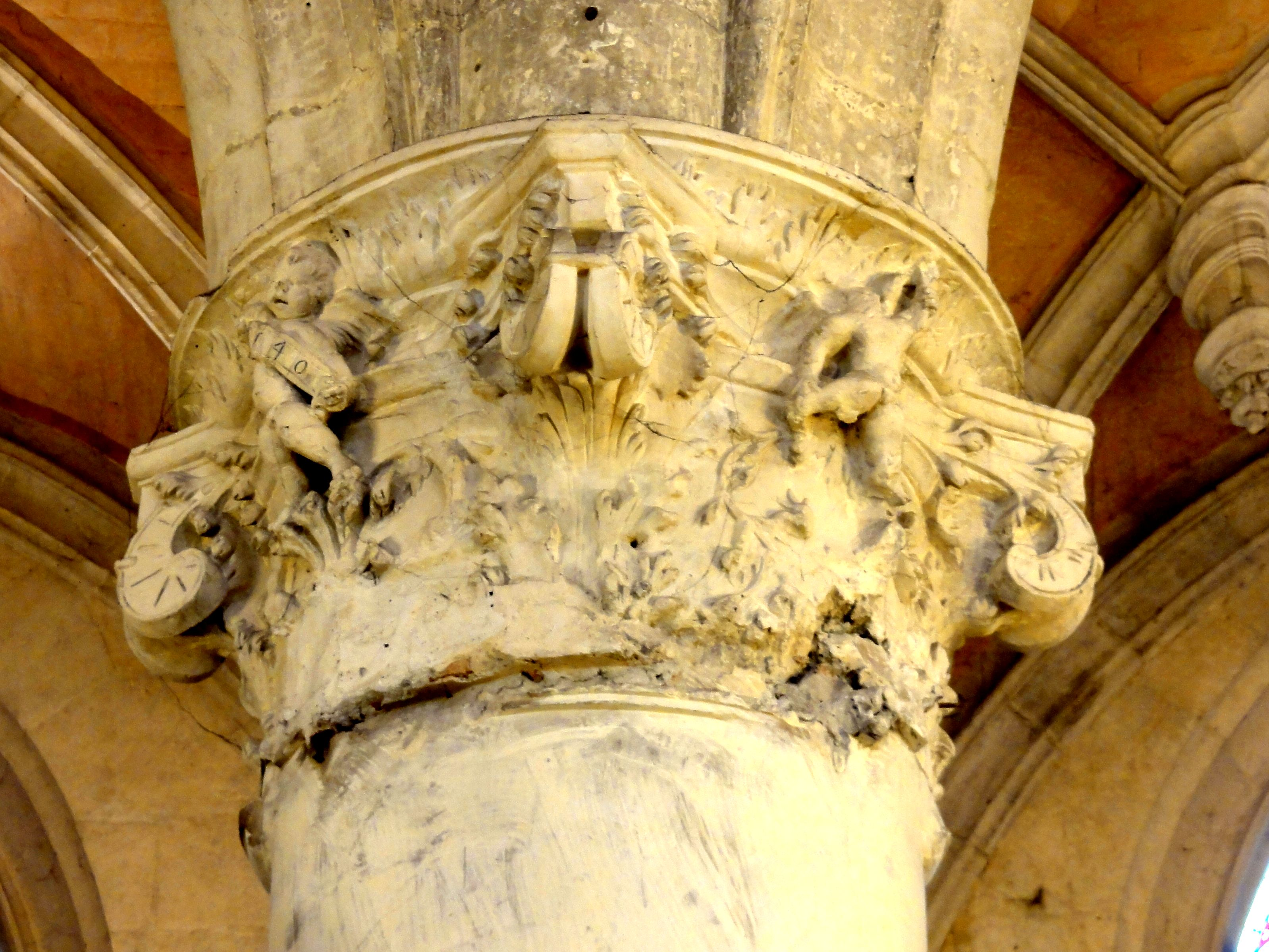 Chapiteau du deuxième pilier du nord.